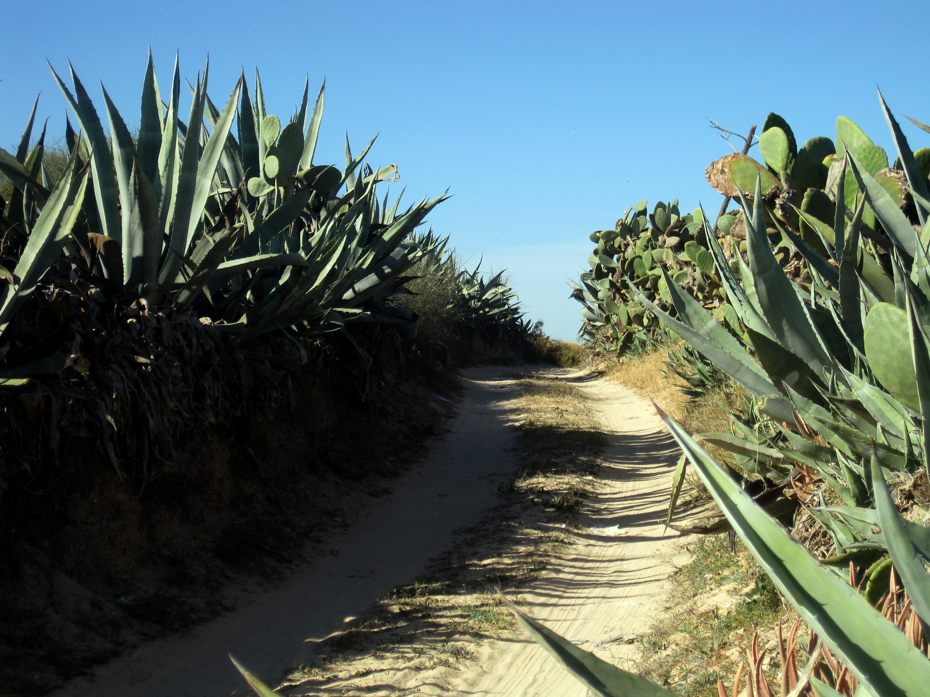 Des agaves qui couvrent les haies d'une piste à Mezraya